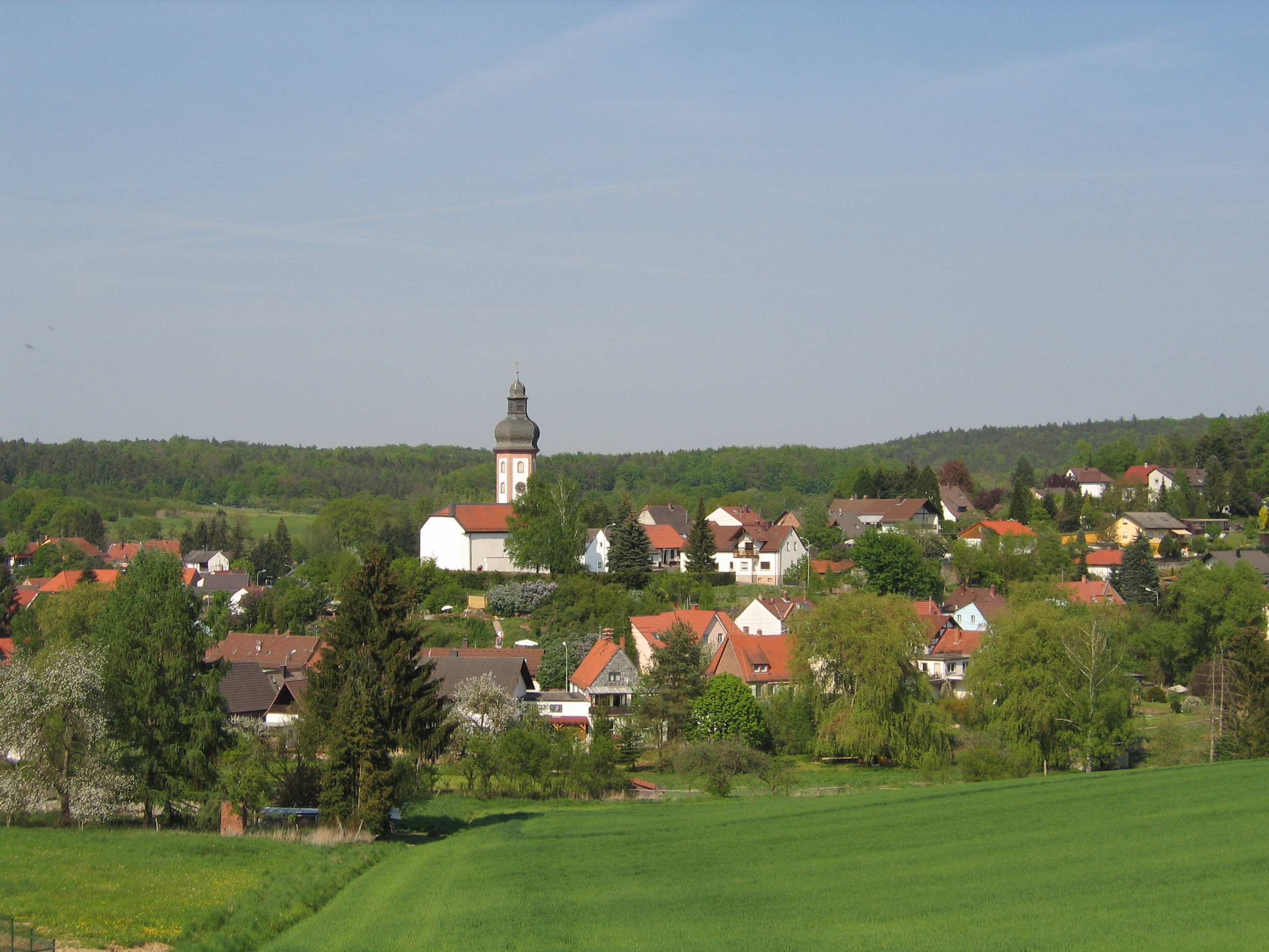 Blick auf Neuhemsbach von Süden